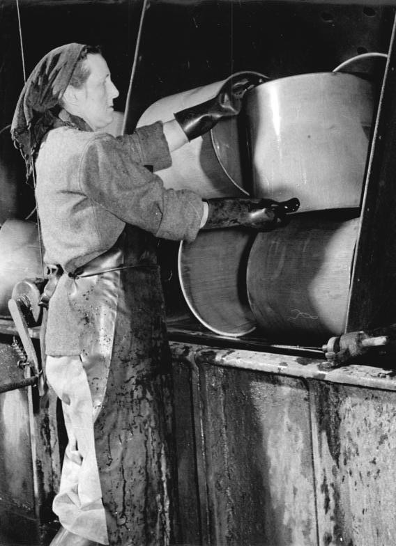 Zentralbild-Krueger 10 Motive 19.2.1955 Im Wettbewerb von Mann zu Mann Wer kennt nicht die Namen Werner Hesse und Heinz Werder? Sie sind die Inititatoren des Wettbewerbs von Mann zu Mann, der in vielen volkseigenen Betrieben zum Vorbild genommen und erfolgreich durchgeführt wird. Werner Hesse, Presser an der grossen Ziehpresse im Stanzwerk der Eisenhüttenwerke Thale, forderte den Arbeiter an der Druckbank Heinz Werner zum Wettbewerb heraus, täglich 100 Kochtöpfe oder Milchkannen mehr zu bearbeiten. Heinz Werner nahm die Aufforderung an und seit diesem Tage werden täglich unserer Bevölkerung allein aus Thale, durch die Initiative der beiden Arbeiter, 100 Töpfe mehr geliefert. UBz: In der Beizerei kommen die Kochtopf-Rohlinge in das Neutralisierungsbad. Gertrud Bartz, die zu den besten Arbeiterinnen zählt, nimmt die Töpfe aus dem Bad.